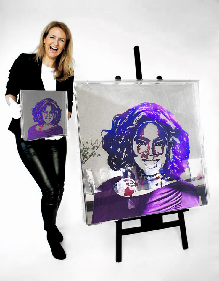 Carola Pavlik, Dutch Contemporary Artist